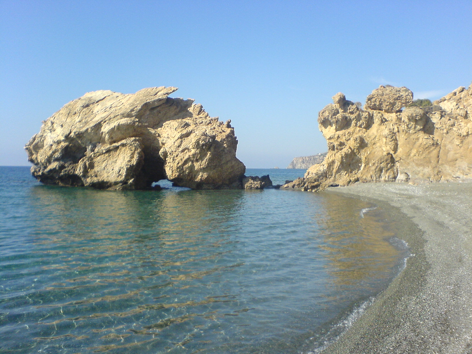 Ψαροχάρακο Τέρτσα